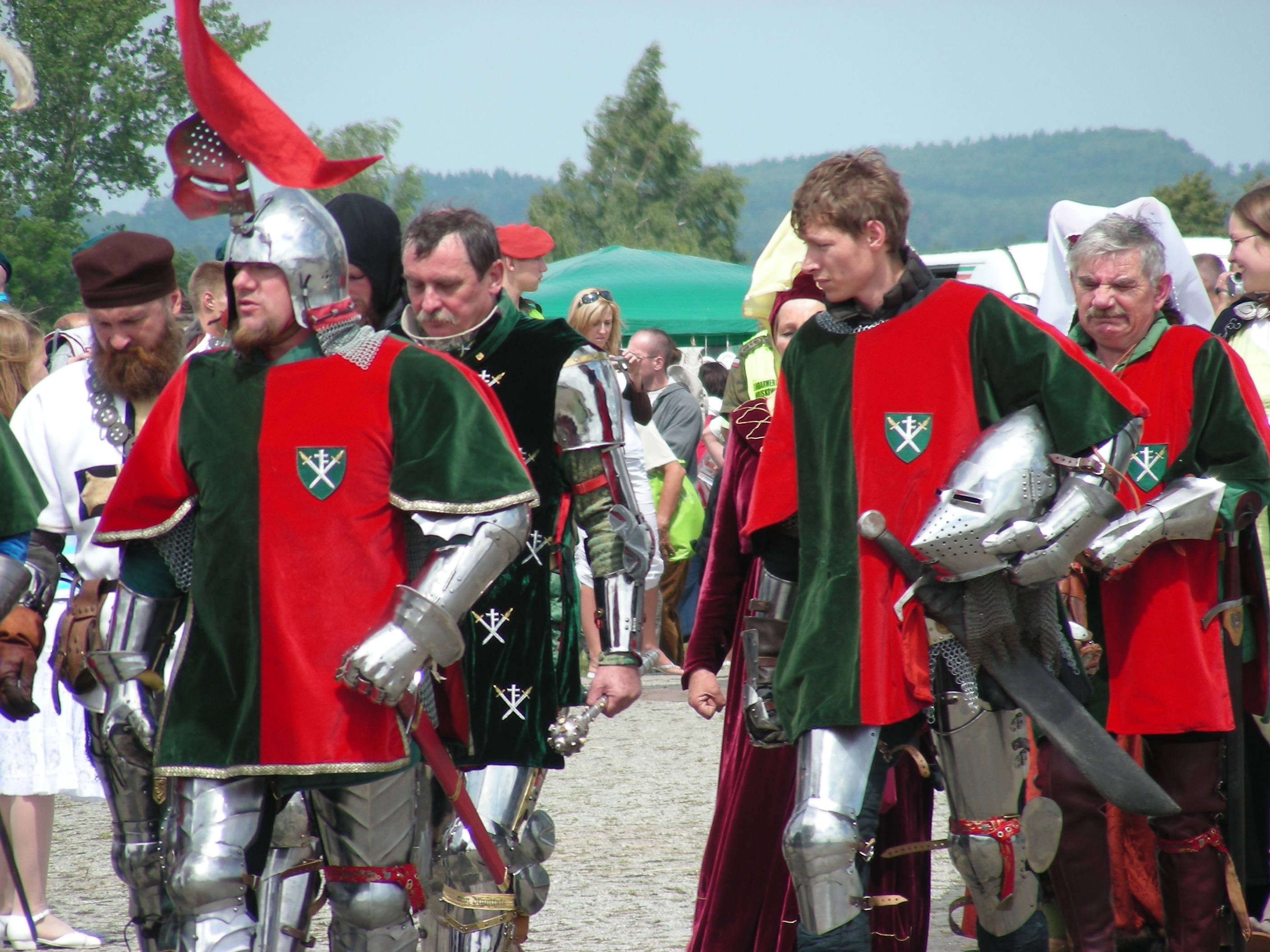 polish